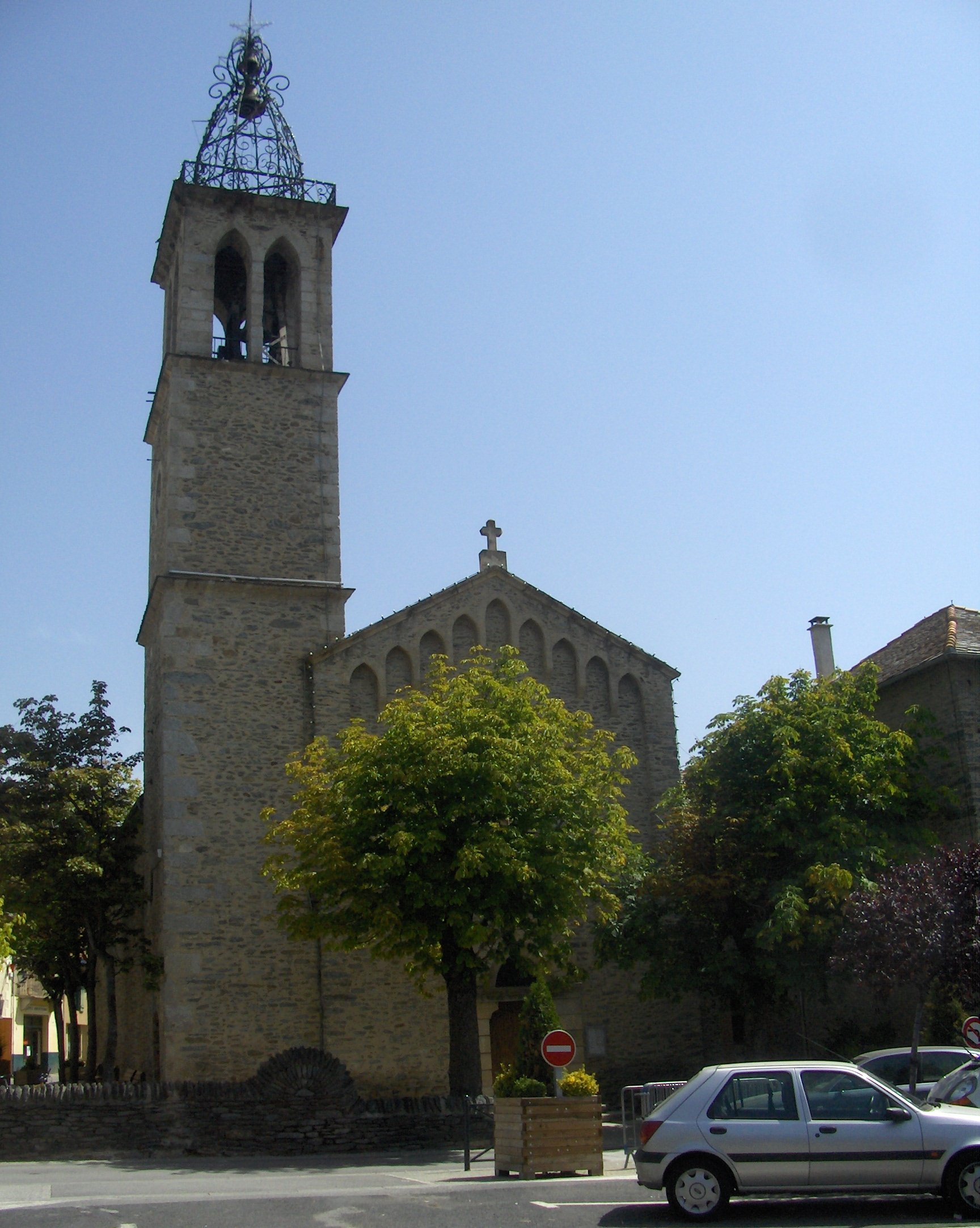 Sant Pere d'Oceja (Alta Cerdanya) .